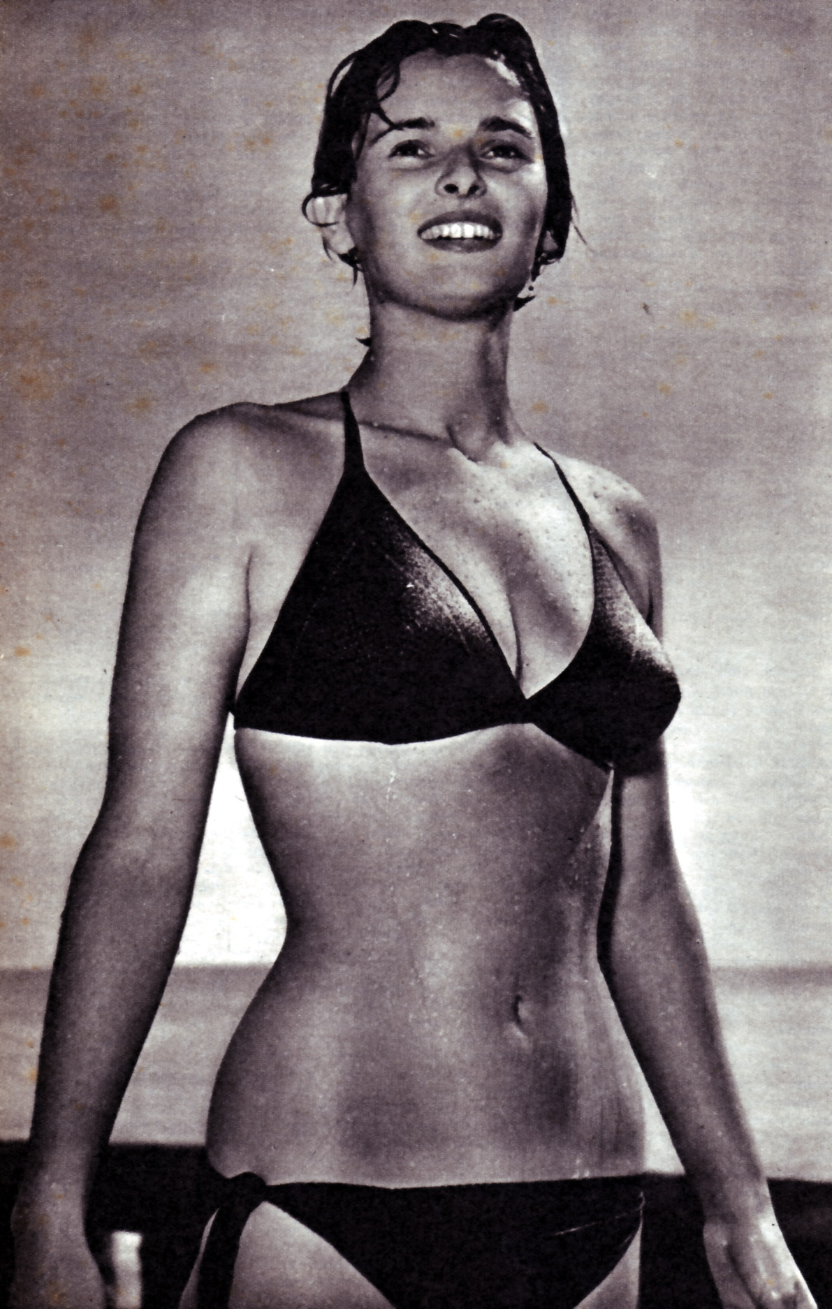 Lucía Bosé, La Settimana INCOM, 9 settembre 1950